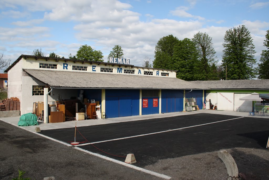 Humanitarna udruga Remar Croatia - Terapijska zajednica, centar za rehabilitaciju i resocijalizaciju osoba sa margine društva.